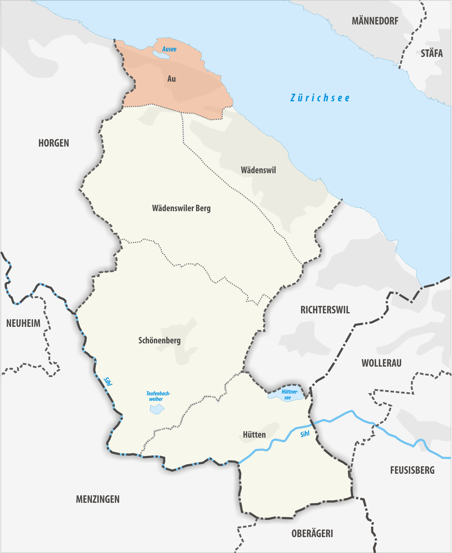 Wädenswil-Au